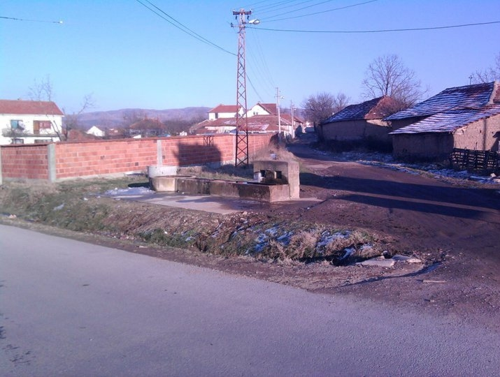 fshati